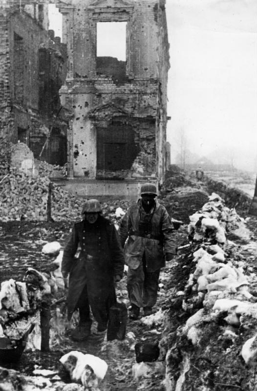 Russland, Cholm, Soldaten vor Hausruinen Die heldenhafte Verteidigung der Kampftruppe Scherer, die im Osten 107 Tage vom Feind eingeschlossen war, 128 Feindangriffe schwerer und schwerster Art abwies und mit zehn Gegenangriffen und 43 Gegenstößen beantwortete, hat in der Welt größtes Aufsehen erregt. Unsere Aufnahme aus dem Kampfgebiet der Gruppe zeigt das Ruinenfeld einer von ihr besetzten Ortschaft. 8.6.1942 [Herausgabedatum] [Sowjetunion, Cholm.- Zwei deutsche Soldaten der "Kampfgruppe Scherer" vor Hausruinen]